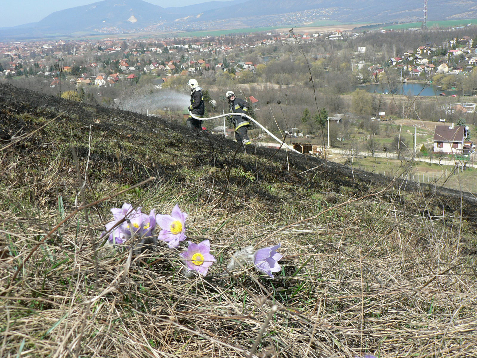 Gondatlan tűz nyomai a Szél-hegyen, túlélő leánykökörcsinnel